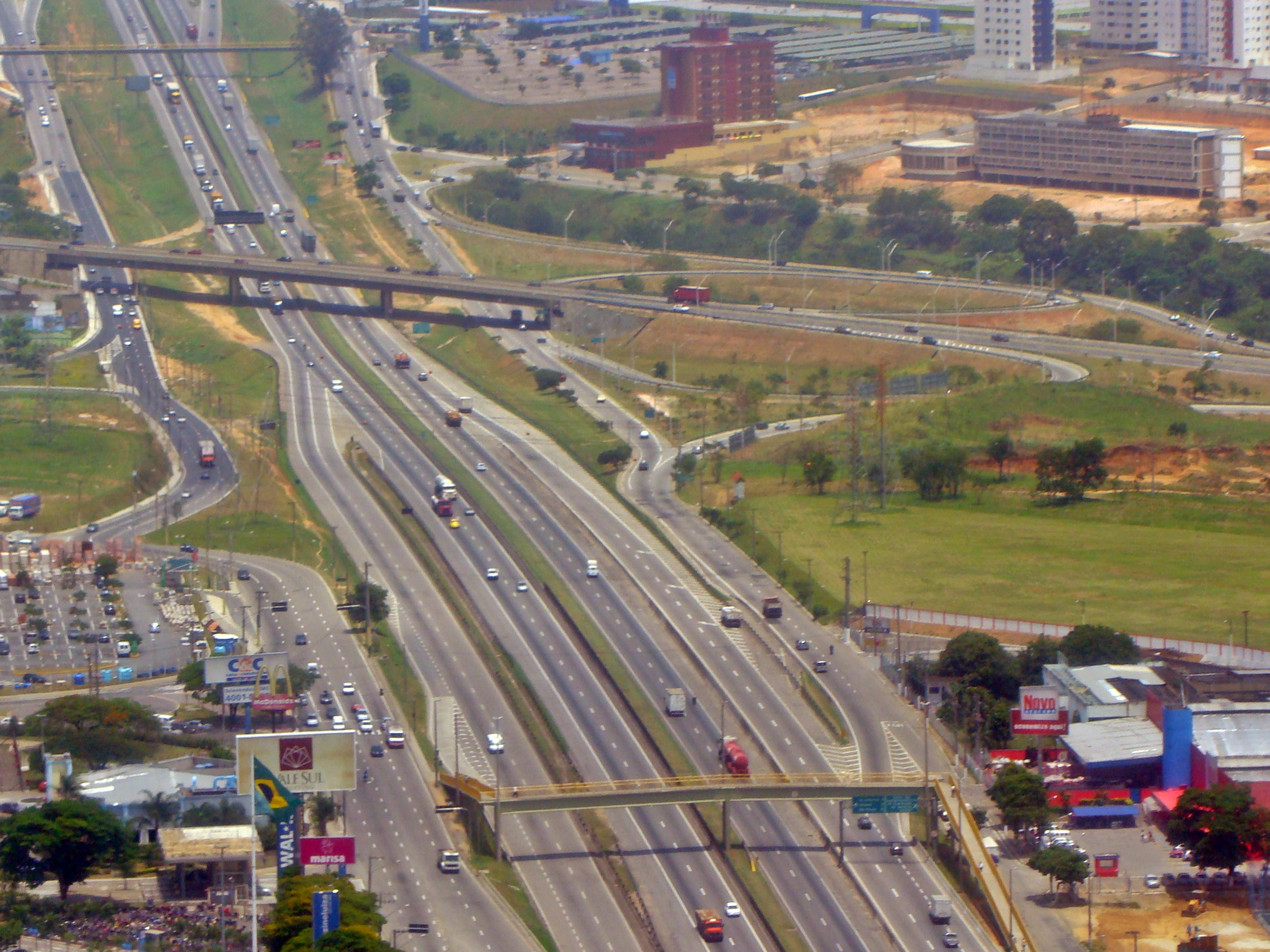 rodovia Presidente Dutra na altura de são josé dos campos